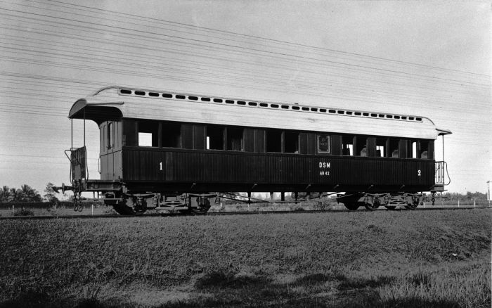 Foto. Personenrijtuig met eerste en tweede klas gedeelte van de Deli-spoorlijn, oostkust Sumatra